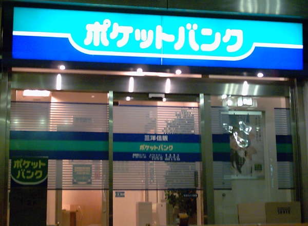 Sanyo Shinpan pocketbank Shinjuku, Tokyo